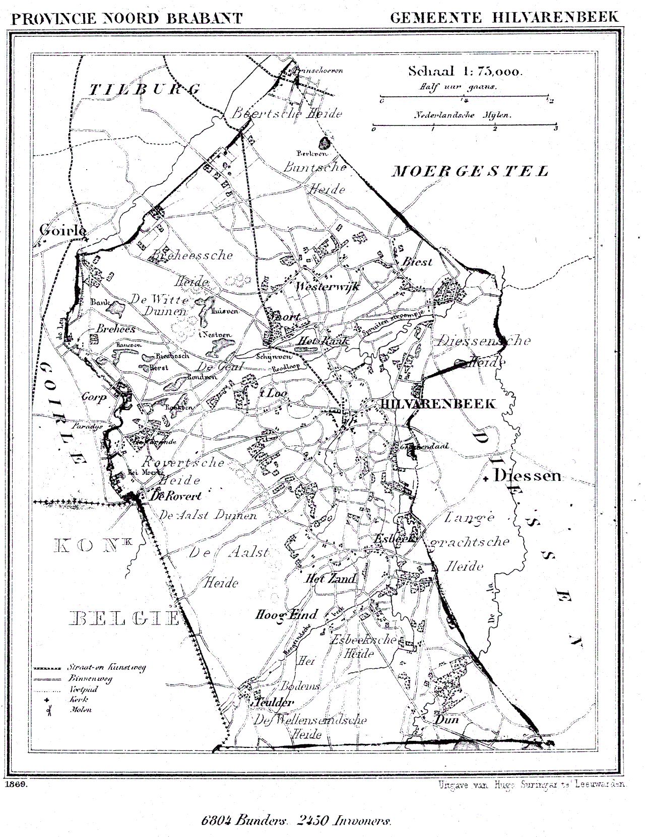 Nederland, Noord-Brabant, Gemeente Hilvarenbeek